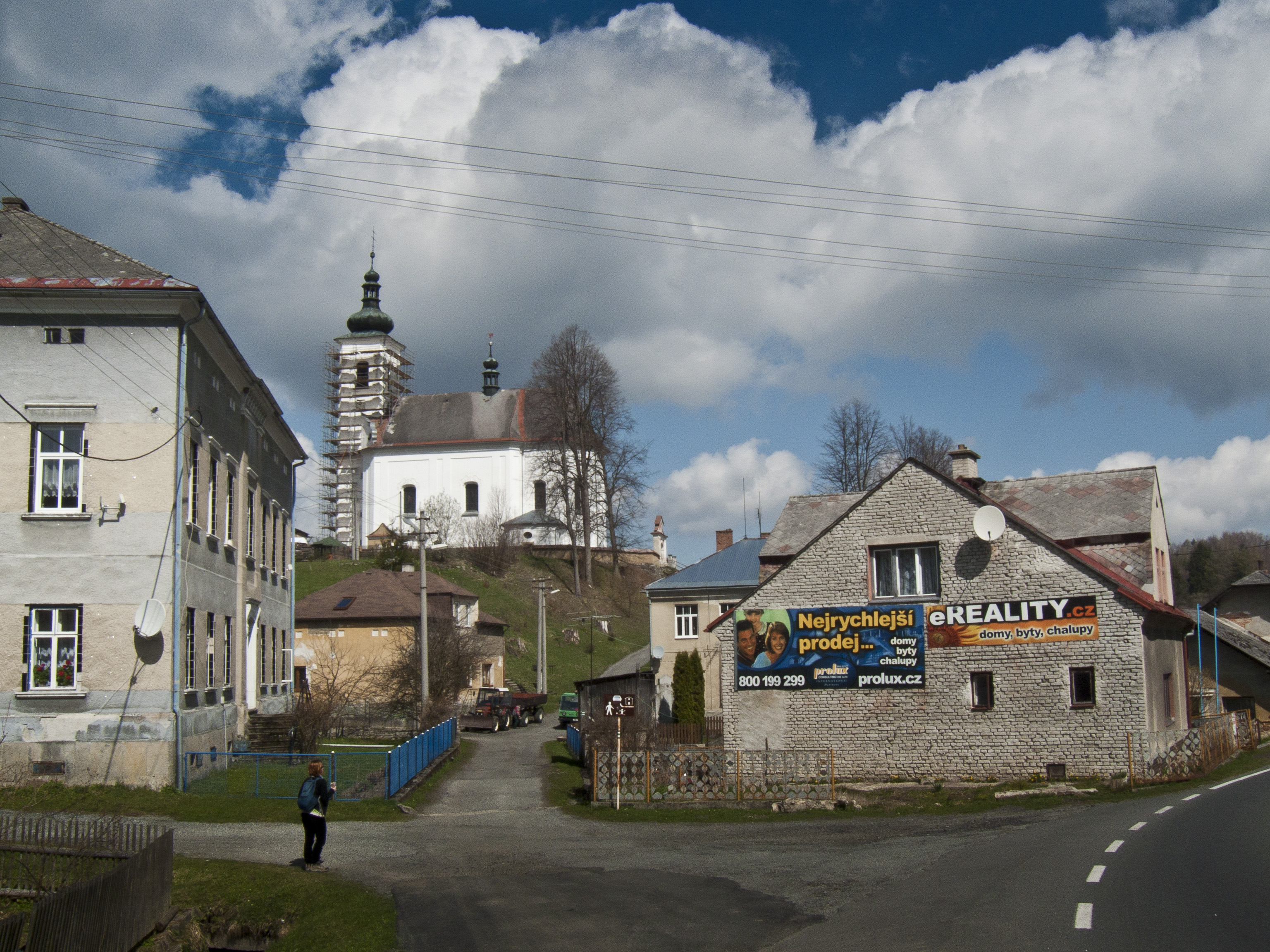 Kopřivná